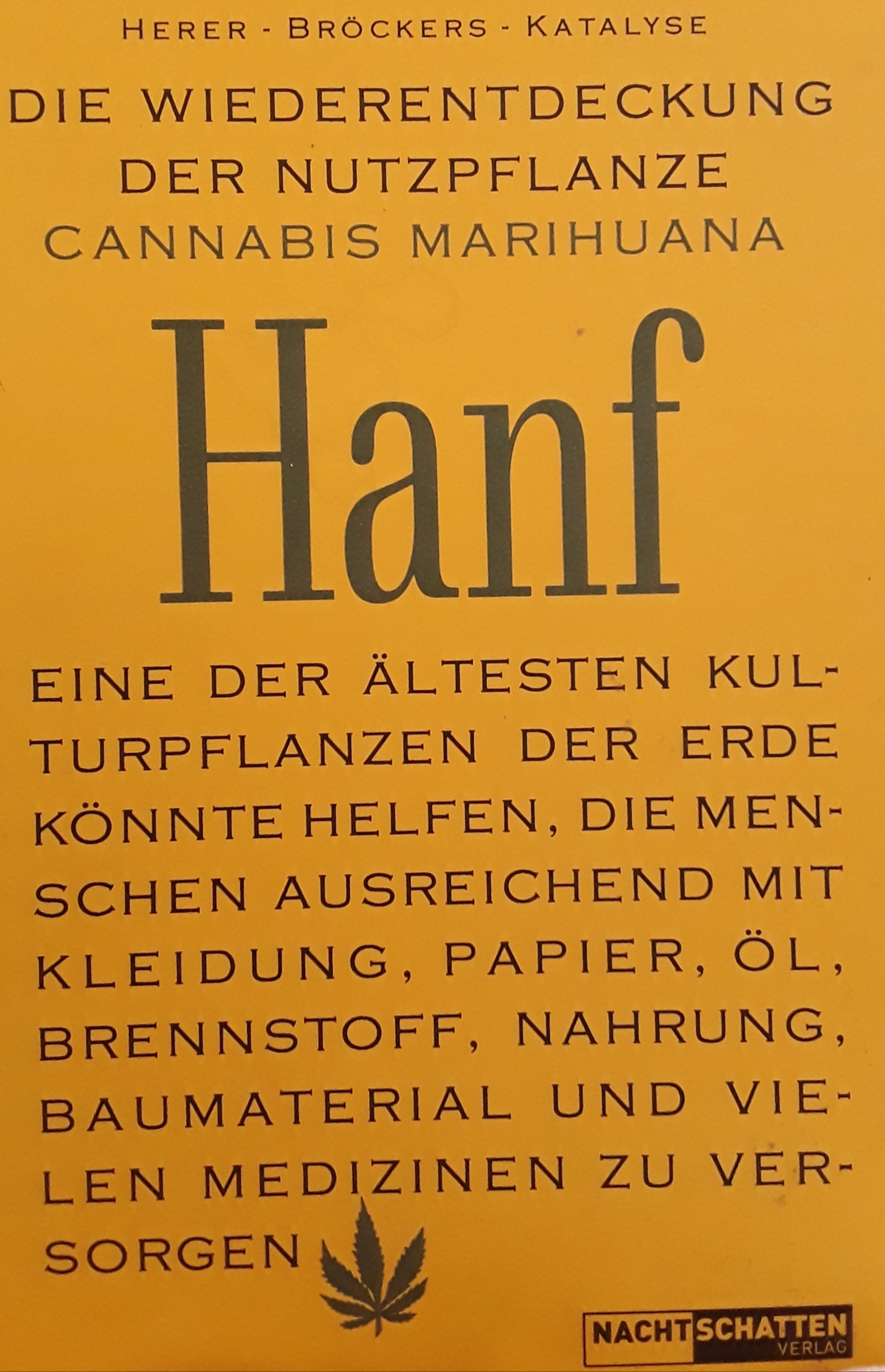 Buchumschlag